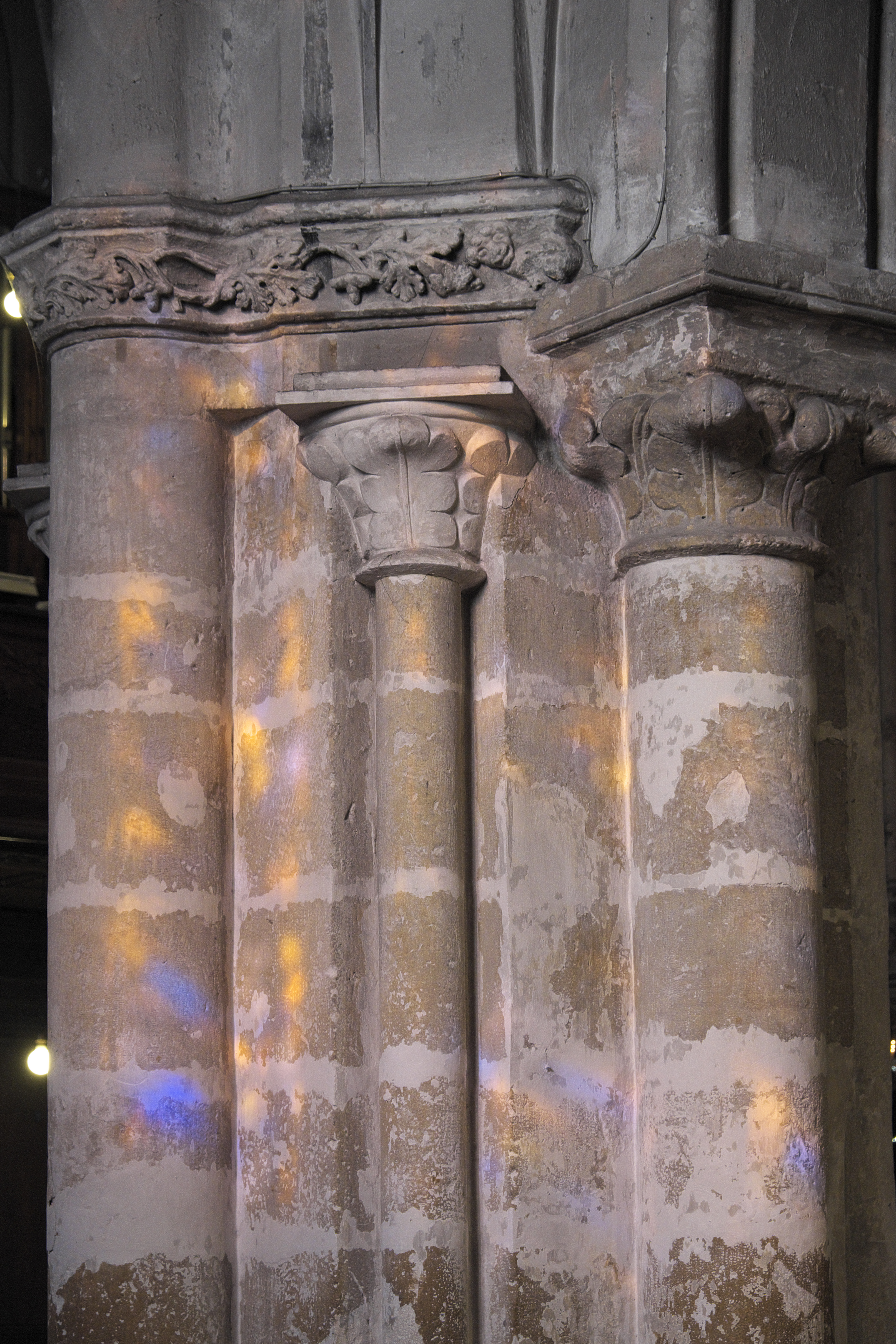 Katholische Pfarrkirche Saint-Martin in Longjumeau im Département Essonne (Île-de-France/Frankreich), Säulen und Kapitelle